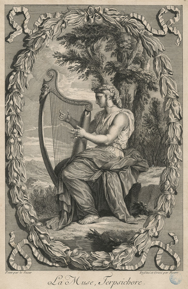 Gravure réalisée selon la technique du burin et de la taille douce de Bernard Picart d'après Eustache Le Sueur représentant la muse de la musique et de la danse Terpsichore jouant de la lyre.